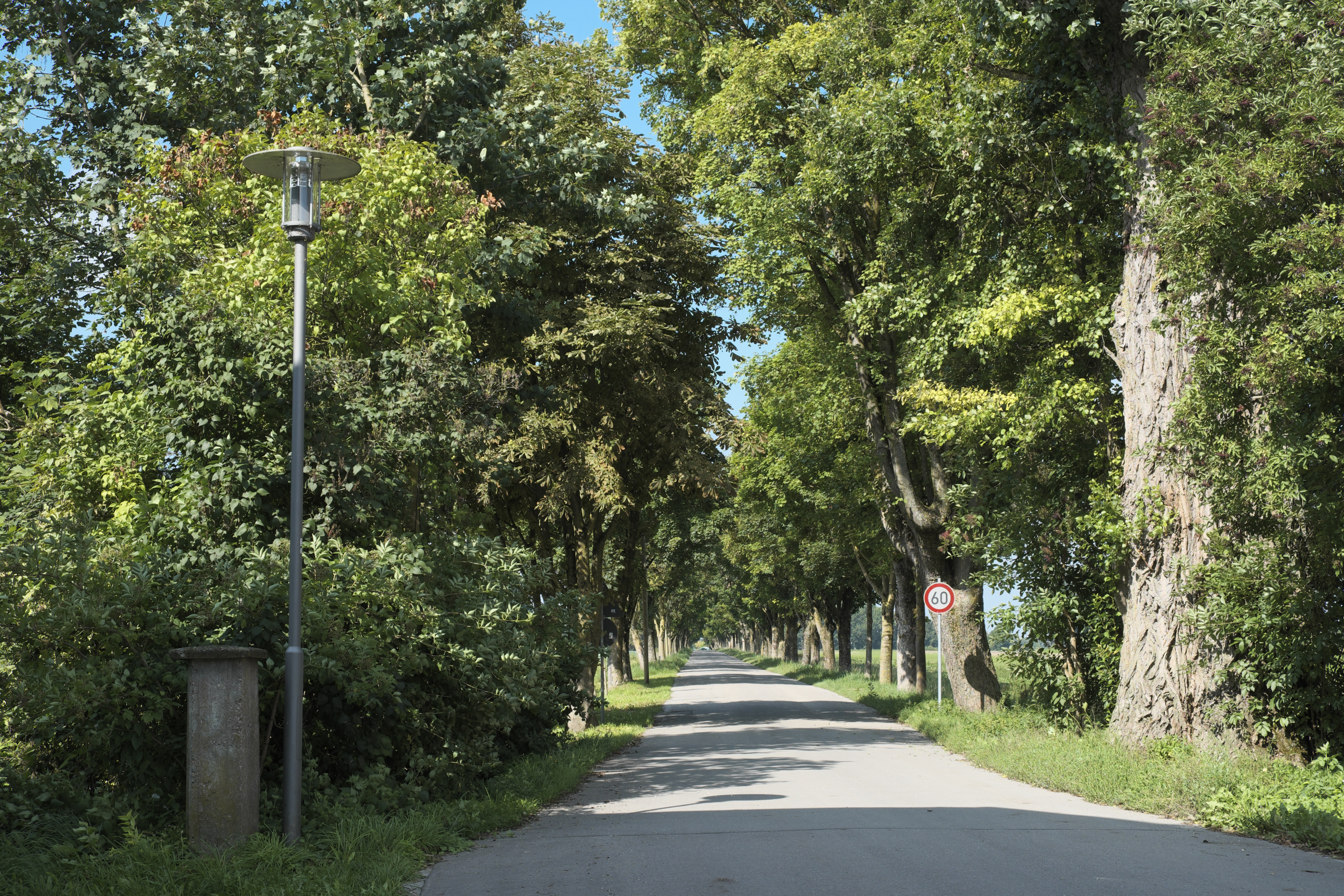 Allee zum Goldachhofes in Ismaning im Landkreis München (Bayern/Deutschland)